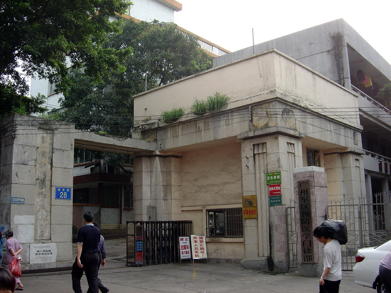 廣州市新一軍印緬陣亡將士公墓東立柱和東門樓。版權說明：使用本相片必須署名「盧潔峰」，否則CC協議將失效，並追究相應的法律責任。